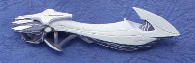 Figura en 3D del arma de pecados capitales, Lypē Katathlipsē, de la serie de anime Kyōkai Senjō no Horizon.